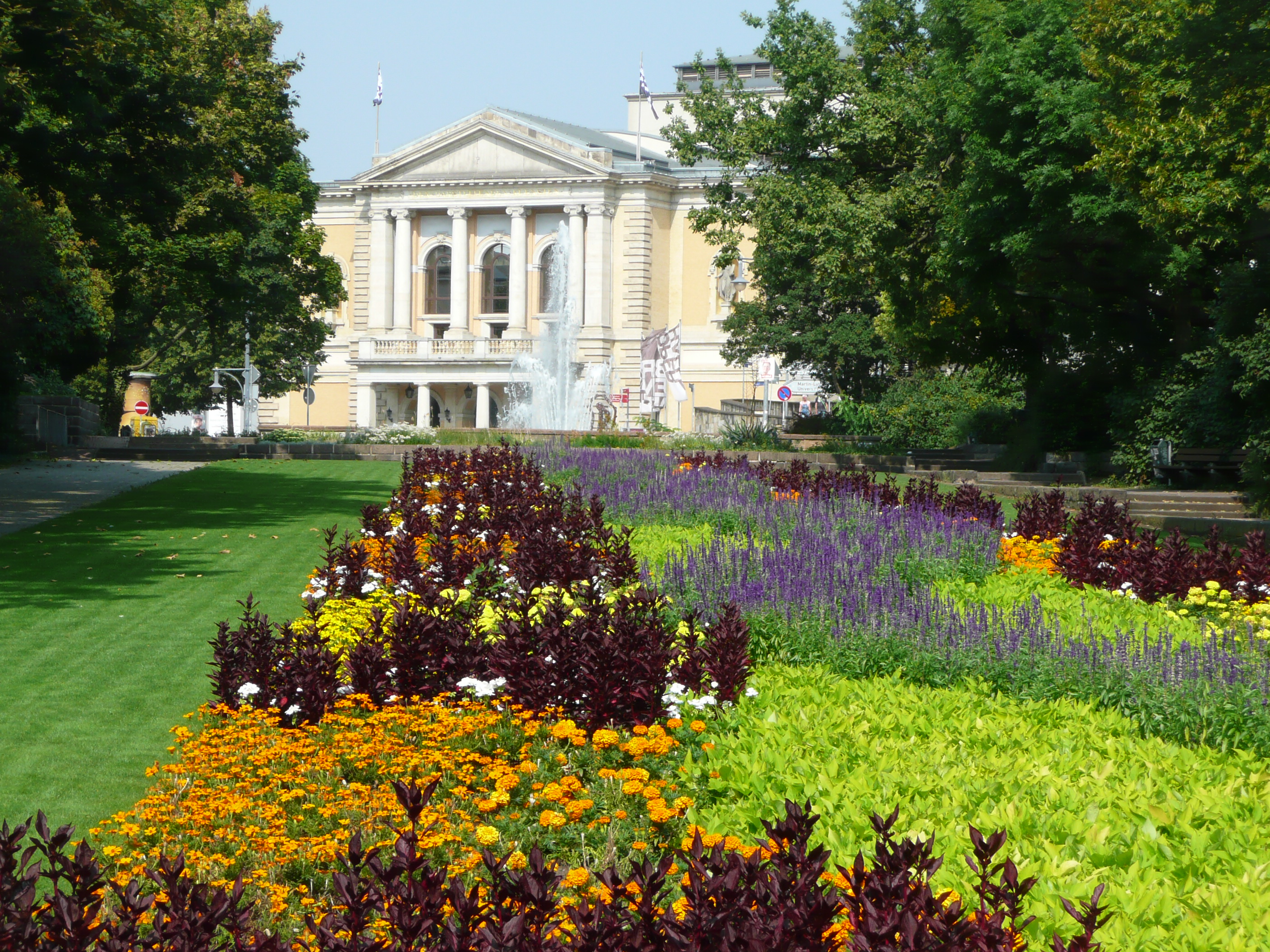 Oper in Halle am Joliot-Curie-Platz